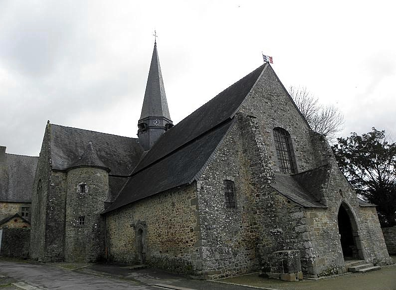 Église Saint-Exupère de Gahard (35).